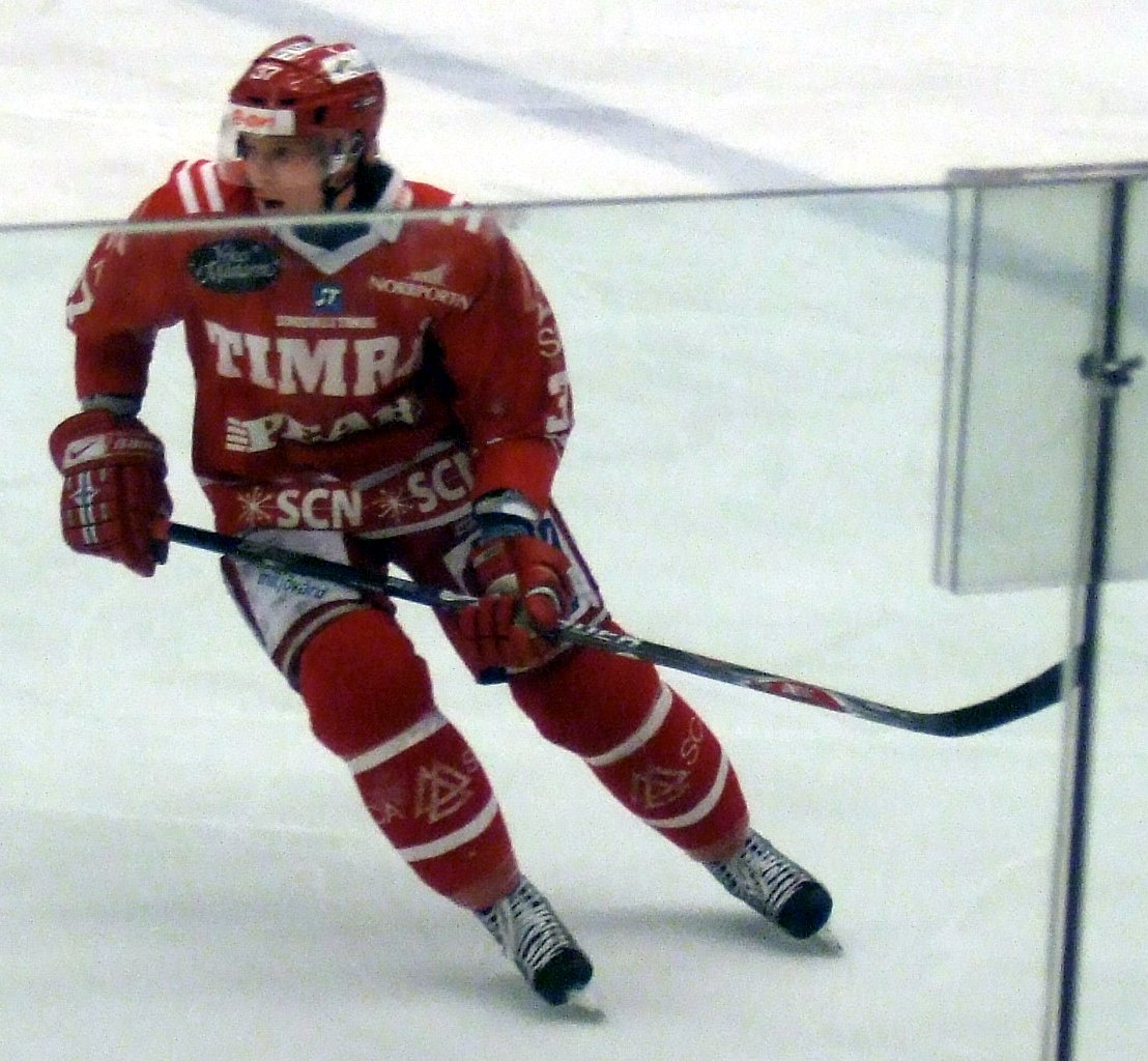 Ice hockey player Mika Pyörälä of Timrå IK in E.ON Arena, Timrå, Sweden